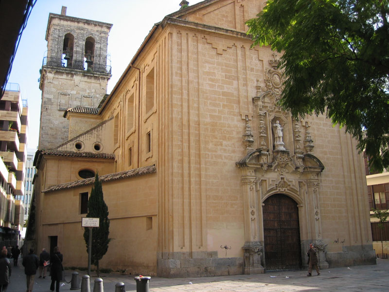 Fachada principal y torre de la iglesia de San Hipólito de Córdoba, provincia de Córdoba, (España).